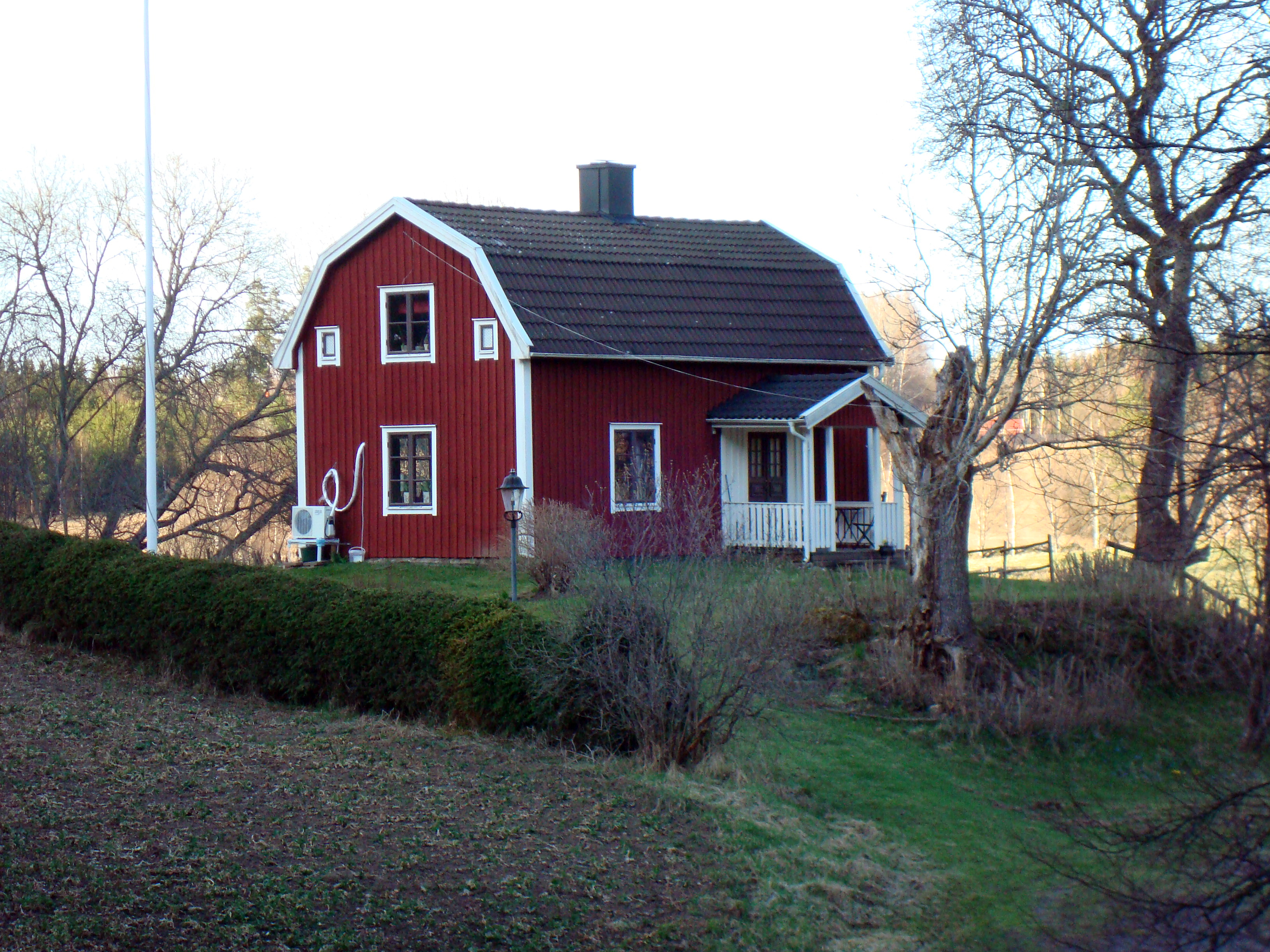 Torp i Hakarp, Sverige